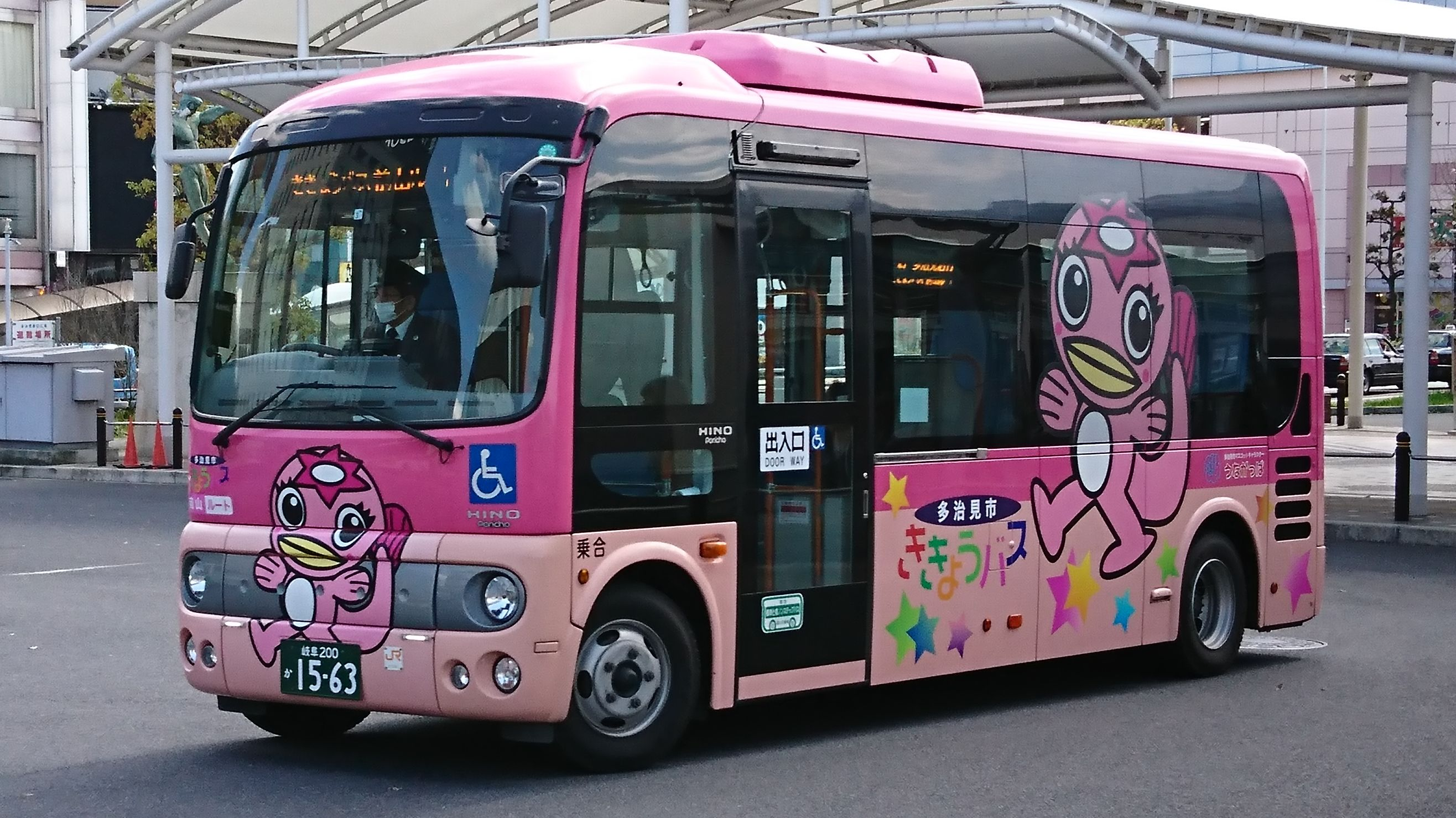 ききょうバス前山ルート